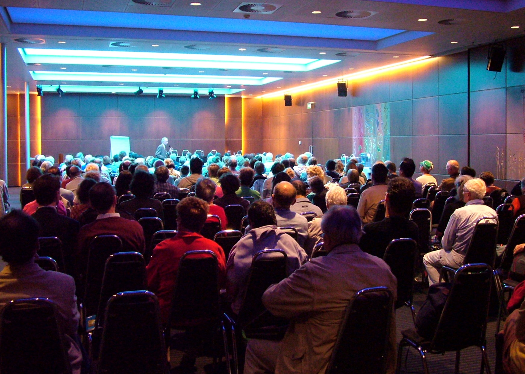 Universala Kongreso de Esperanto, Roterdamo 2008. Humphrey Tonkin en la Kleriga Lundo: Argumentado.